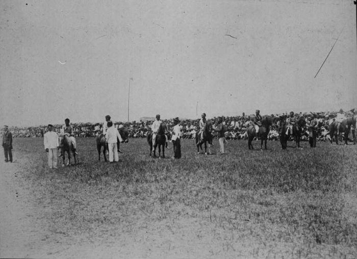 Foto. De start van paarden wedrennen in Si Borong op de Toba Hoogvlakte